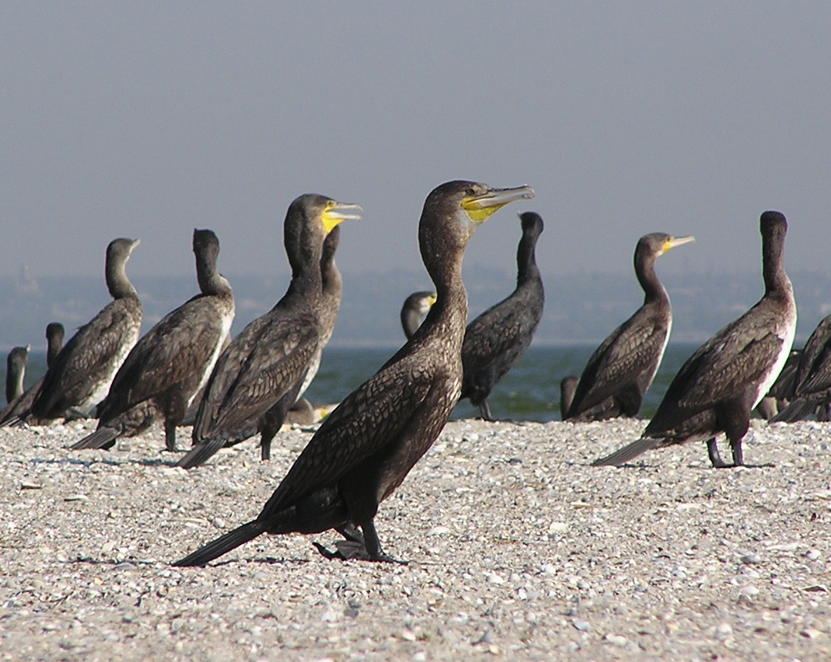 Большой баклан, Phalacrocorax carbo (Linnaeus, 1758), сфотографировано на Белосарайской косе в конце августа 2007